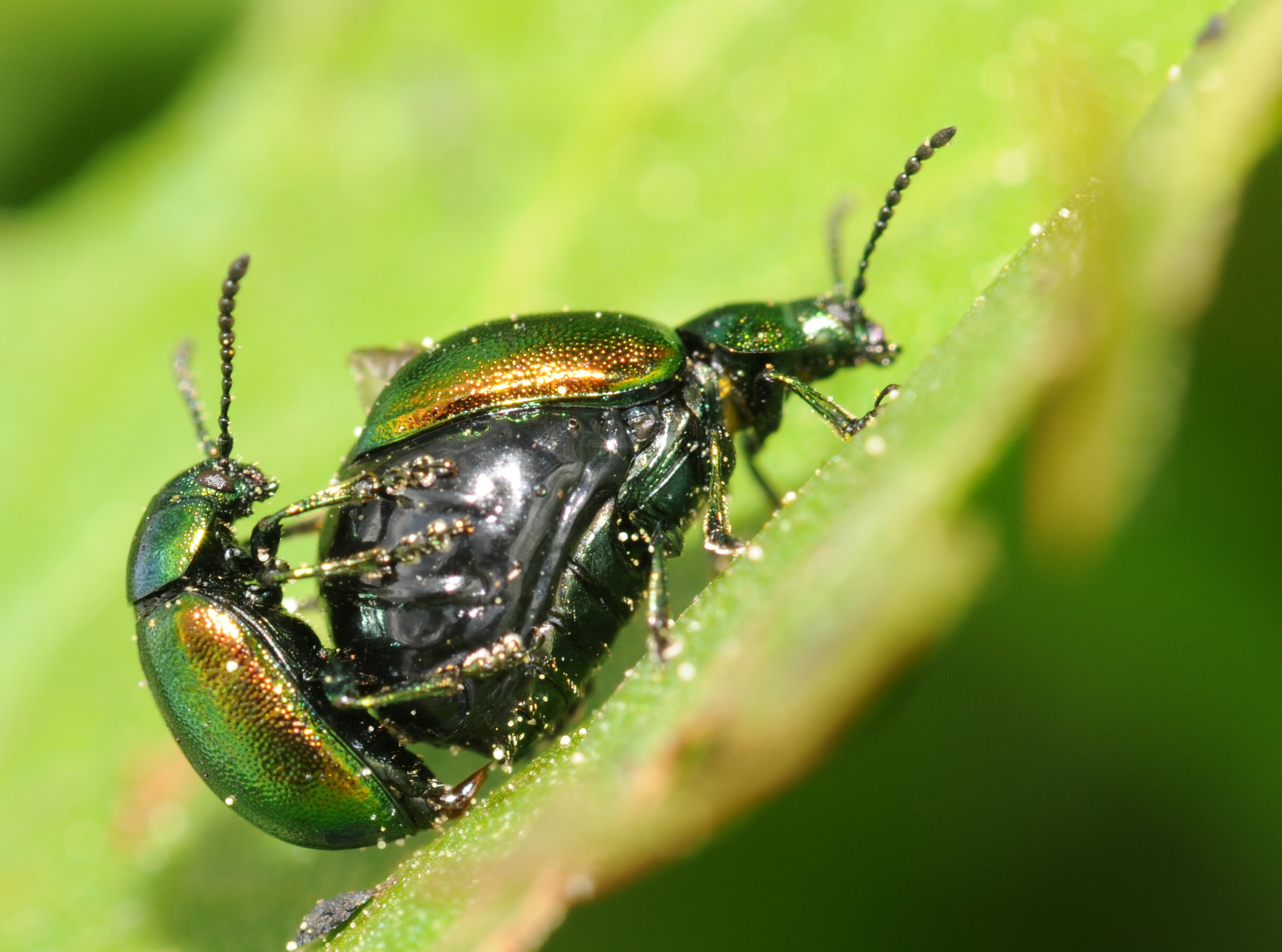 Gastrophysa viridula entrain de s'accoupler. Le mâle est sur la femelle.